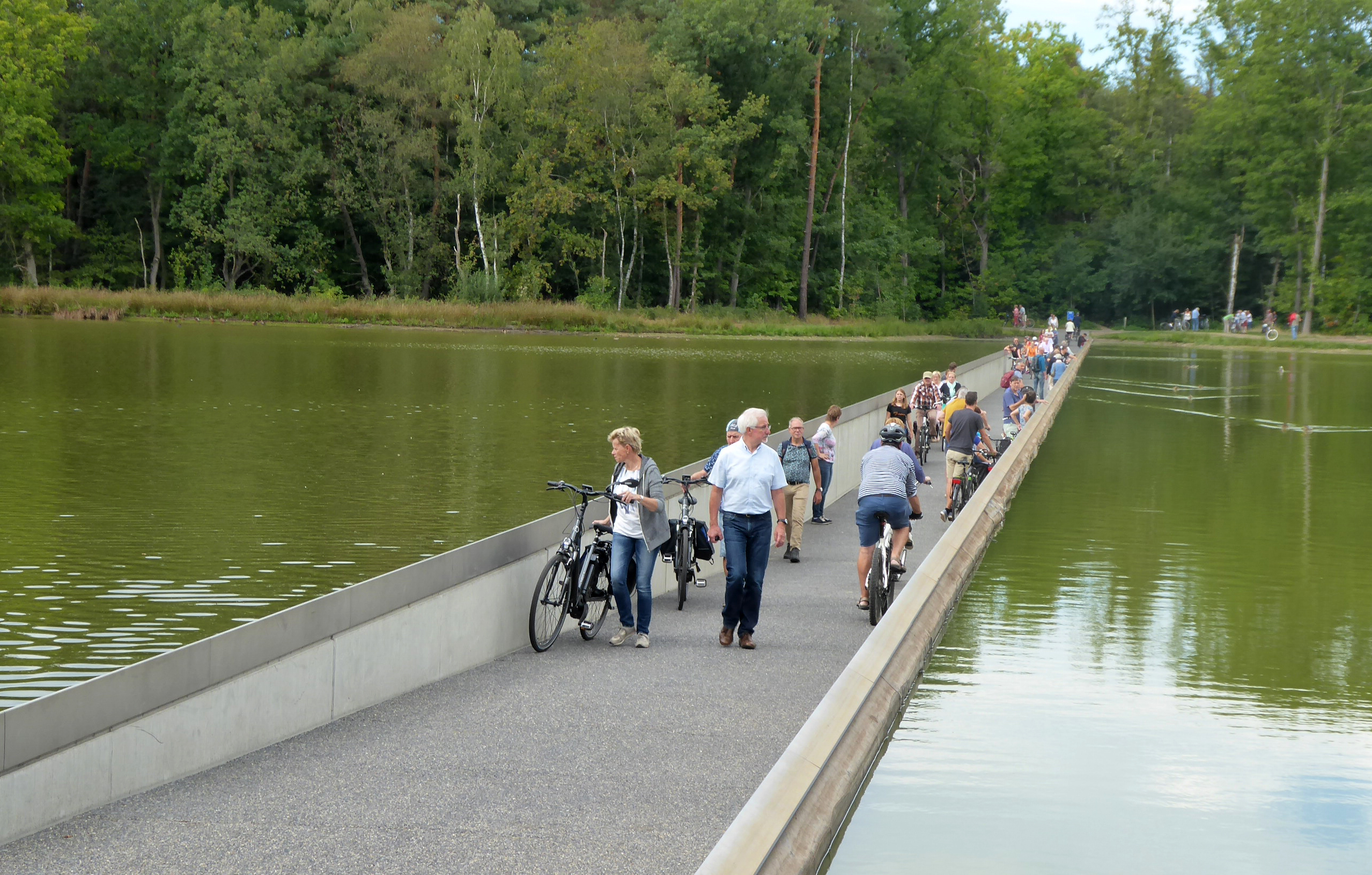 fietspad met het water aan weerszijden op ooghoogte, door een vijver in Bokrijk